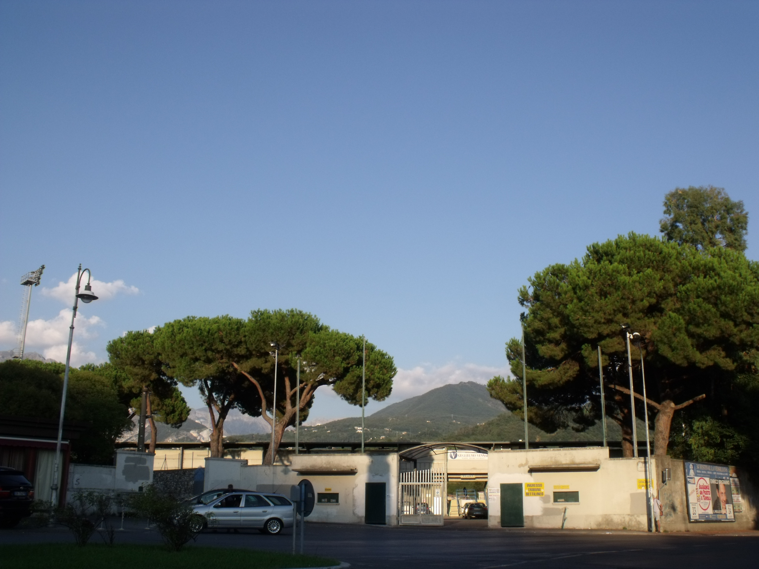 Stadion Stadio dei Marmi in Carrara, Provinz Massa Carrara, Toskana, Italien